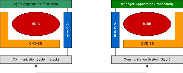 Darstellung des Agent-Manager-Prinzips nach ISO/IEEE 11073